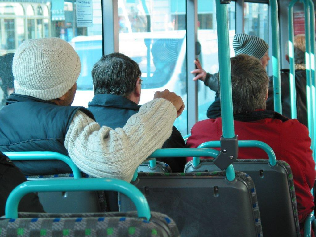 Voyageurs sur le réseau du service des transports en commun de l'agglomération rennaise.